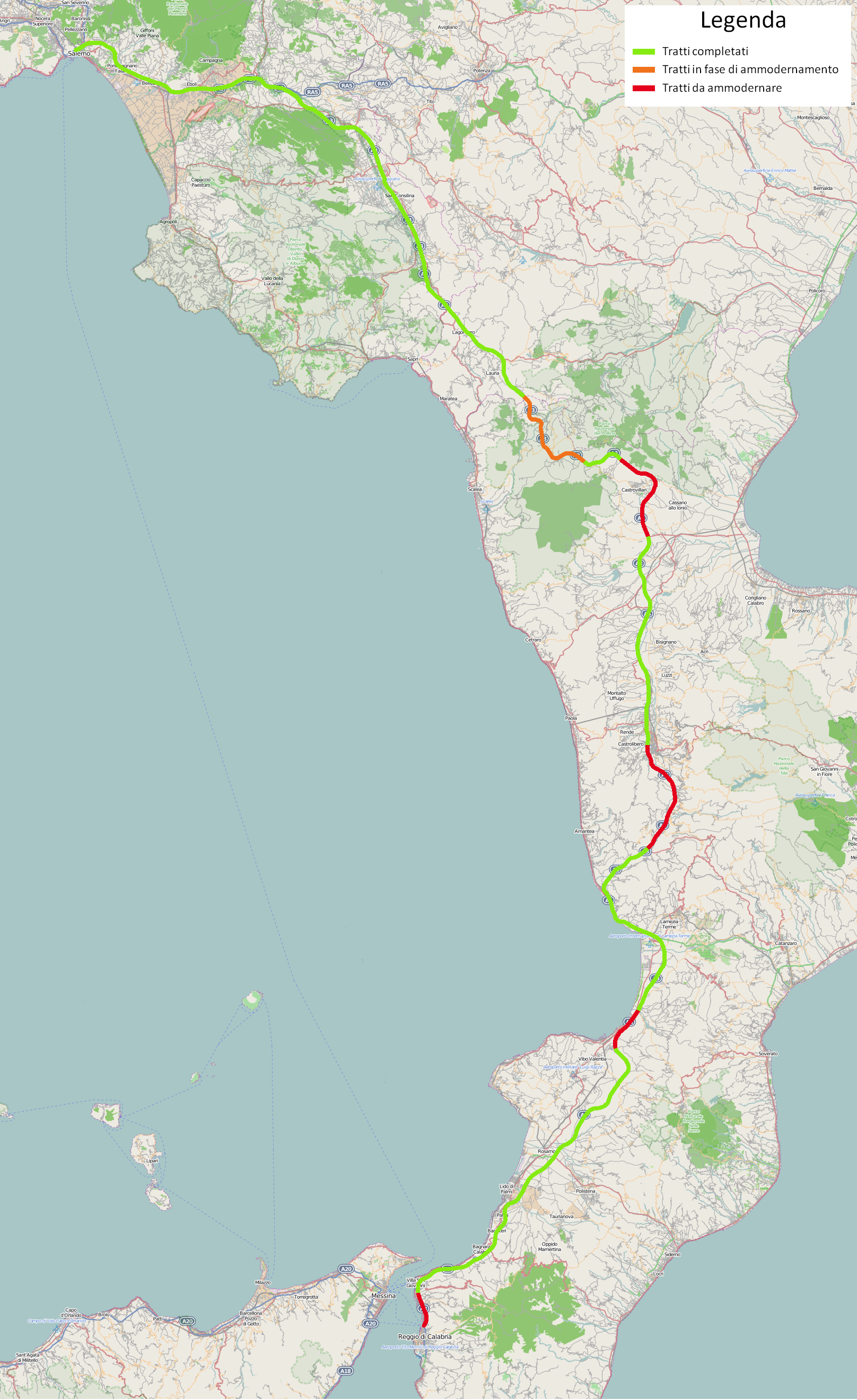 Mappa, aggiornata al 15 aprile 2015, con i tratti completati, in fase di ammodernamento e da ammodernare dell'autostrada A3 Salerno-Reggio Calabria.